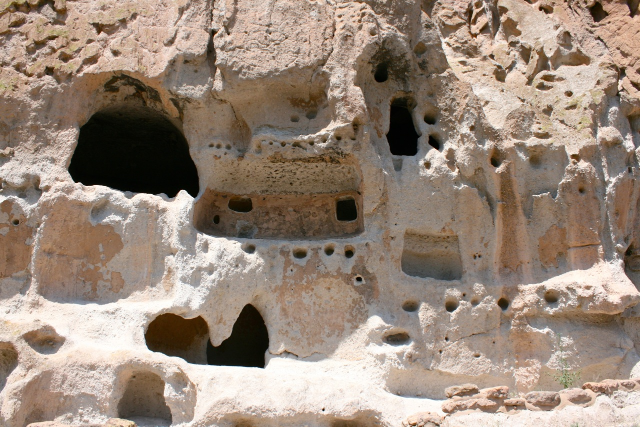 in Bandelier National Monument.